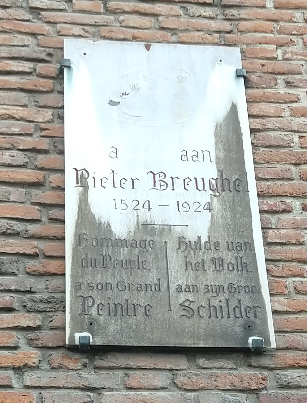 Close-up gedenkplaat Bruegelhuis Hoogstraat 132